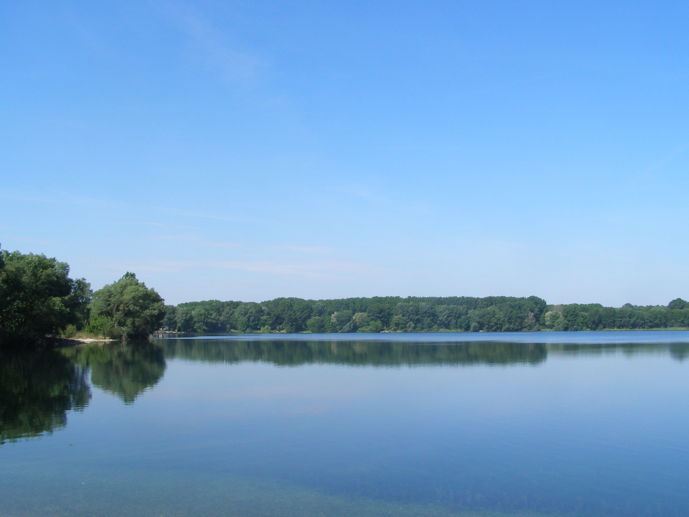 Vojka Lake